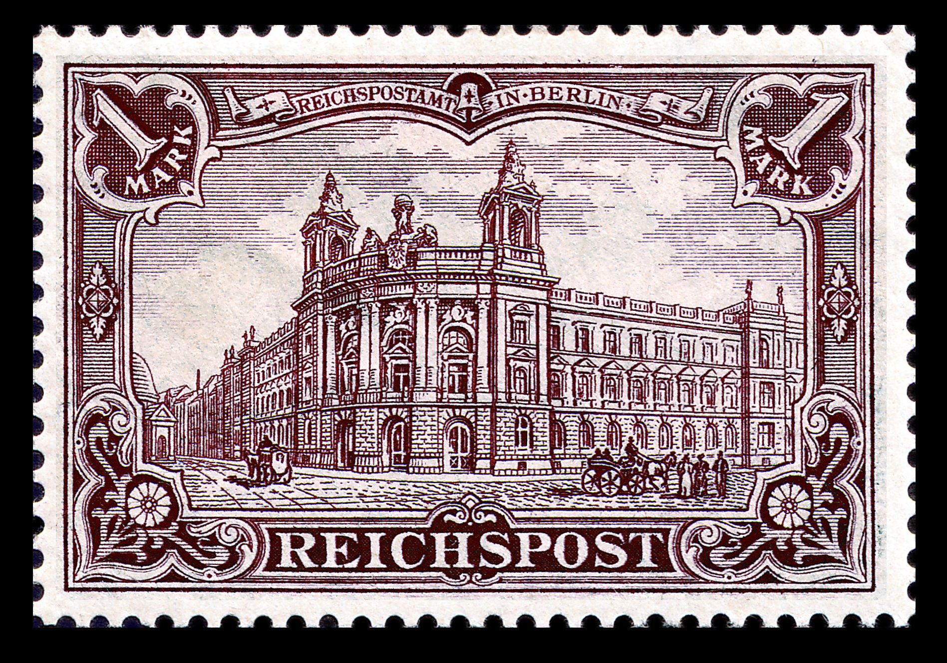 Germania 63 1 b lilabraun geprüft Jaeschke Lantelme